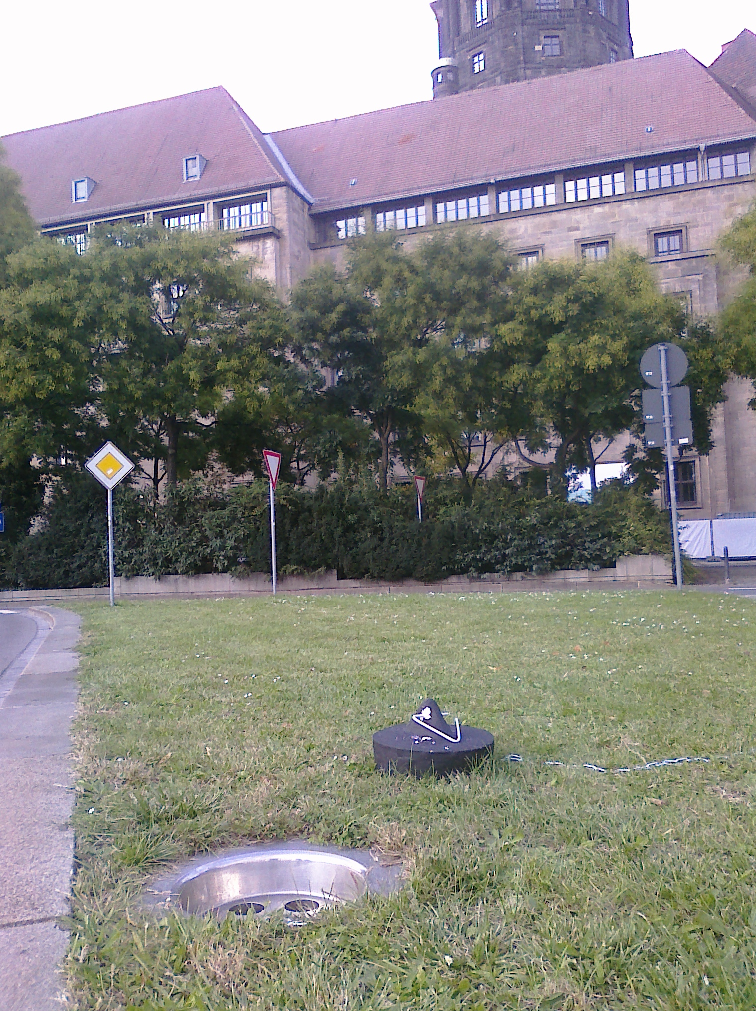 Kunstwerk "Haltepunkte" von BKH Gutmann, welches den Verlauf des Kaitzbaches in Höhe des Dresner Rathauses markiert. (mehr Informationen hier unter Punkt 3